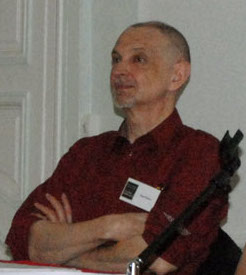 Le psychanalyse Serge Tisseron au 5ème colloque interdisciplinaire Icône-Image "Culture et numérique", samedi 5 juillet 2008